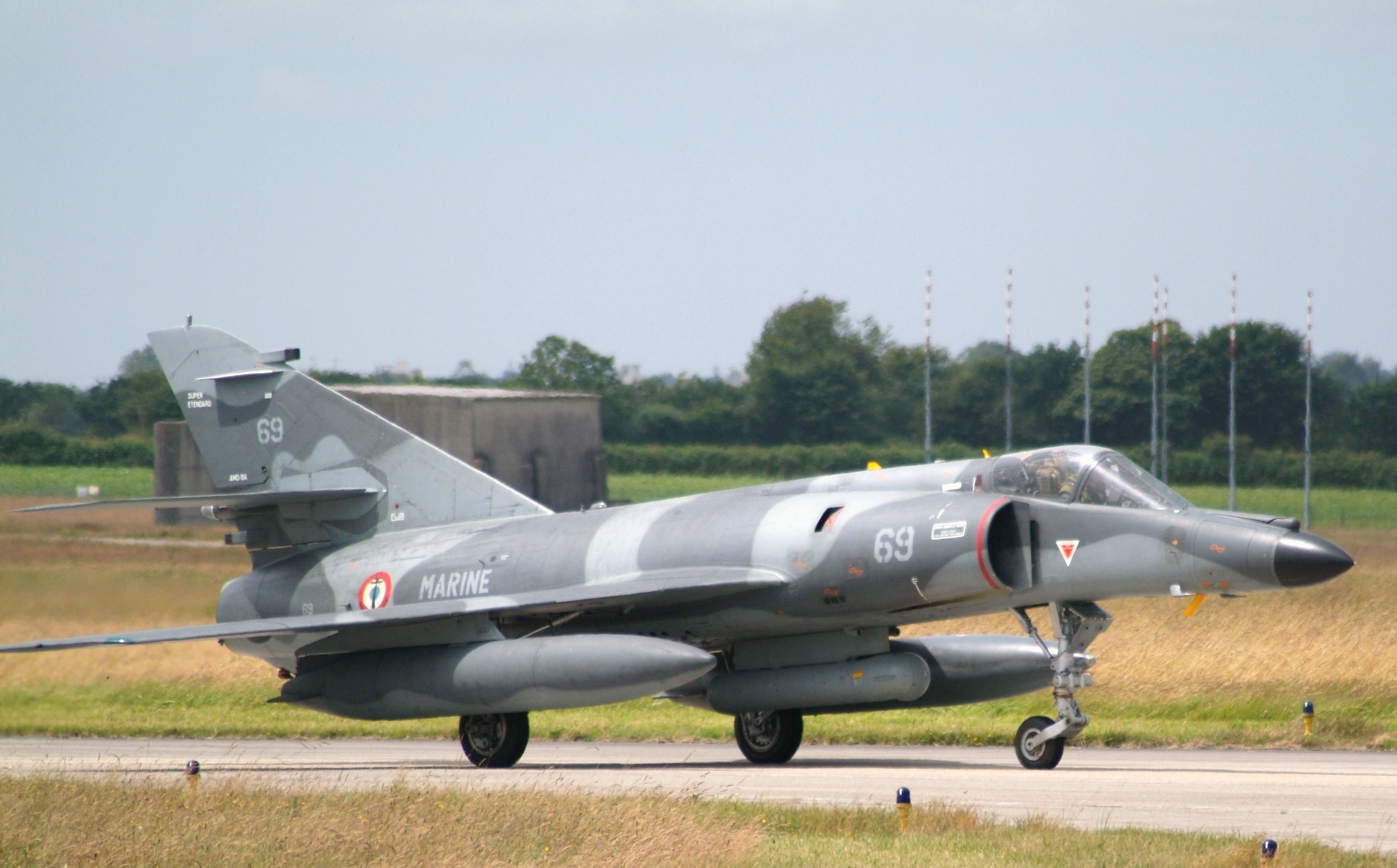 69 Super Etendard French Navy